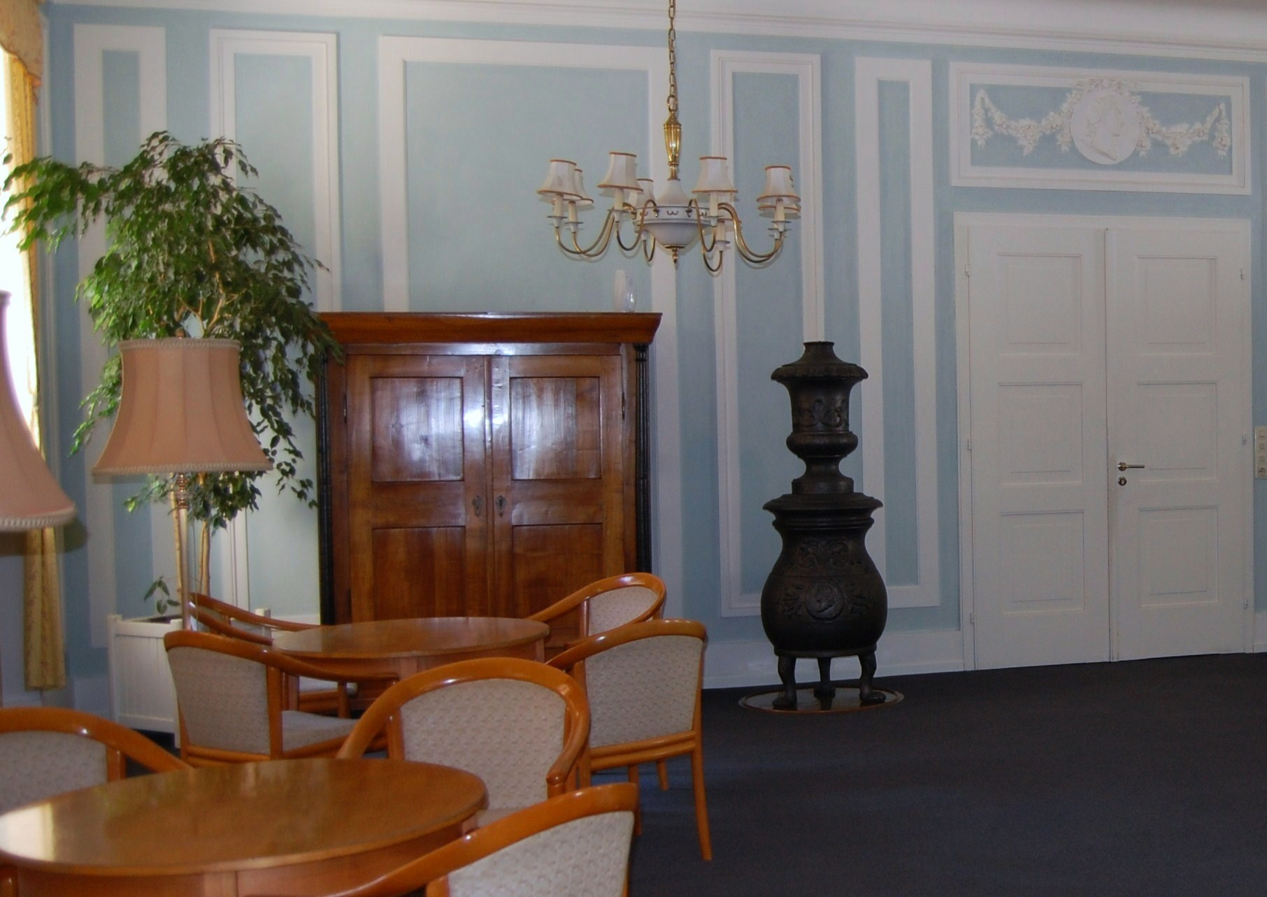 Innenansicht im Lesesaal (Saalbau) des Brunnenbaues von Bad Bocklet